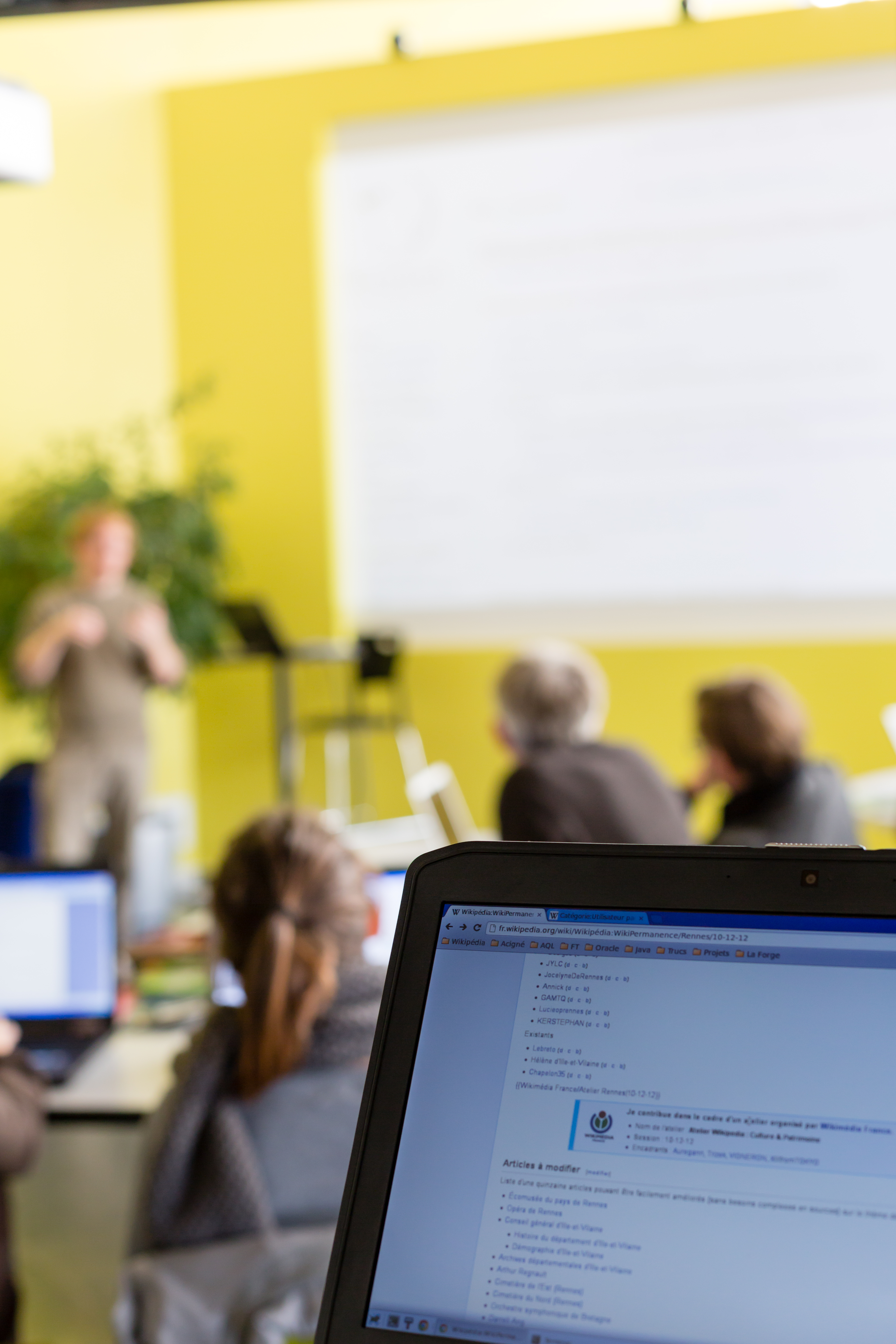 Un écran affiche la page de préparation de l'évènement alors que Vigneron parle en arrière-plan, pendant la WikiPermanence GLAM du 10/12/2012 à Rennes.